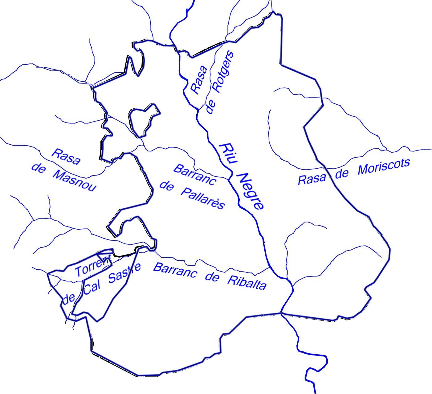 Mapa hidrogàfic del municipi de Solsona (Solsonès)